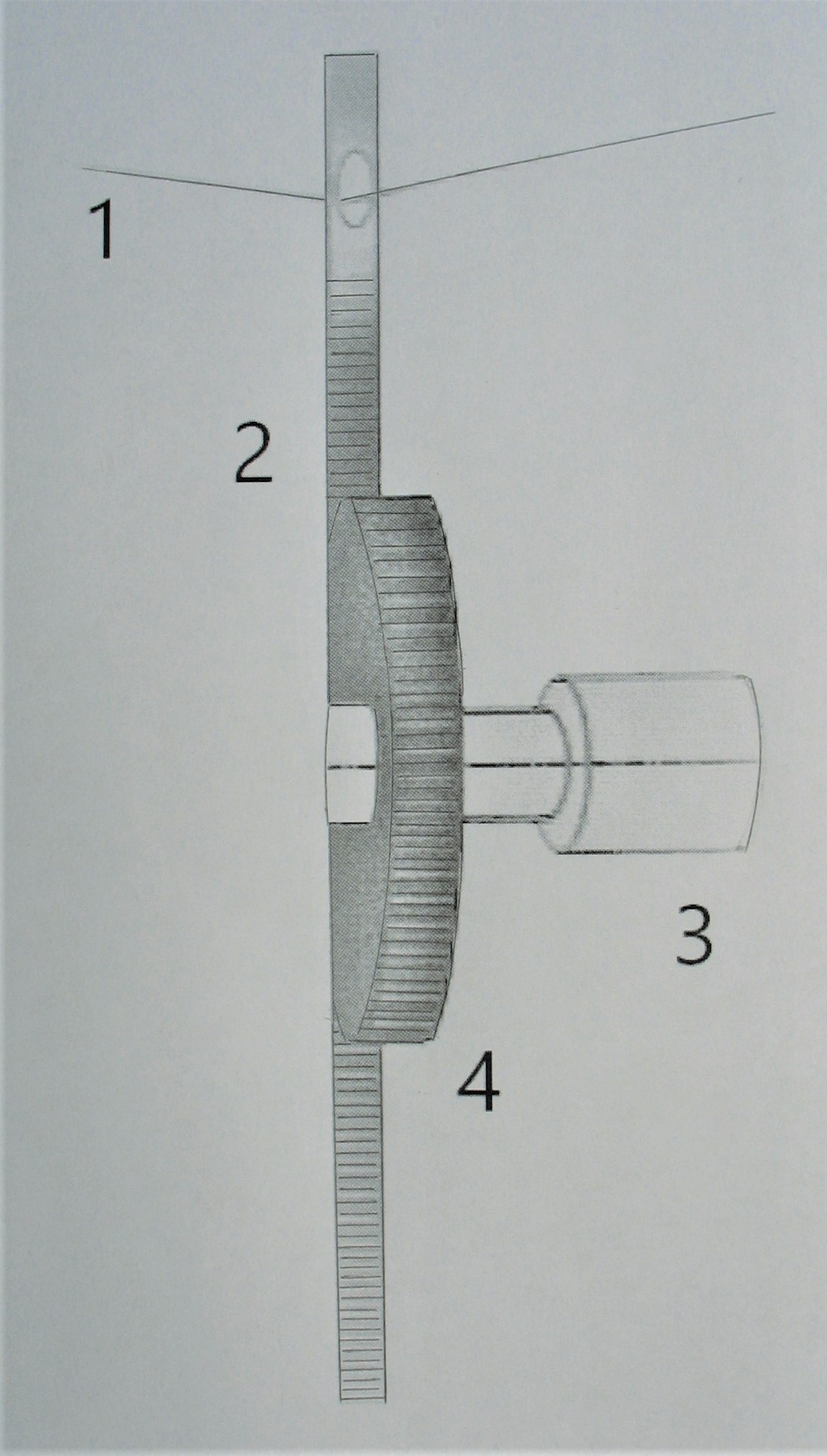 Schéma pohonu žakárových nitěnek krokovými motory